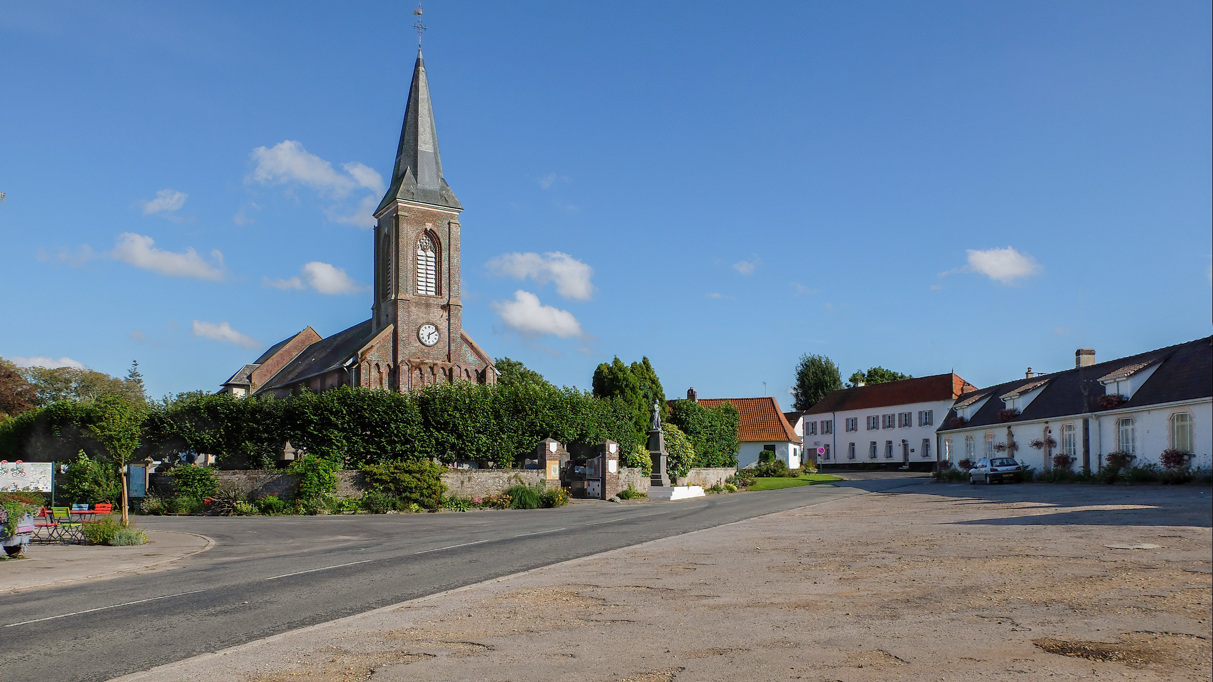 Vue de la Grand-place de Saint-Josse (Pas-de-Calais).